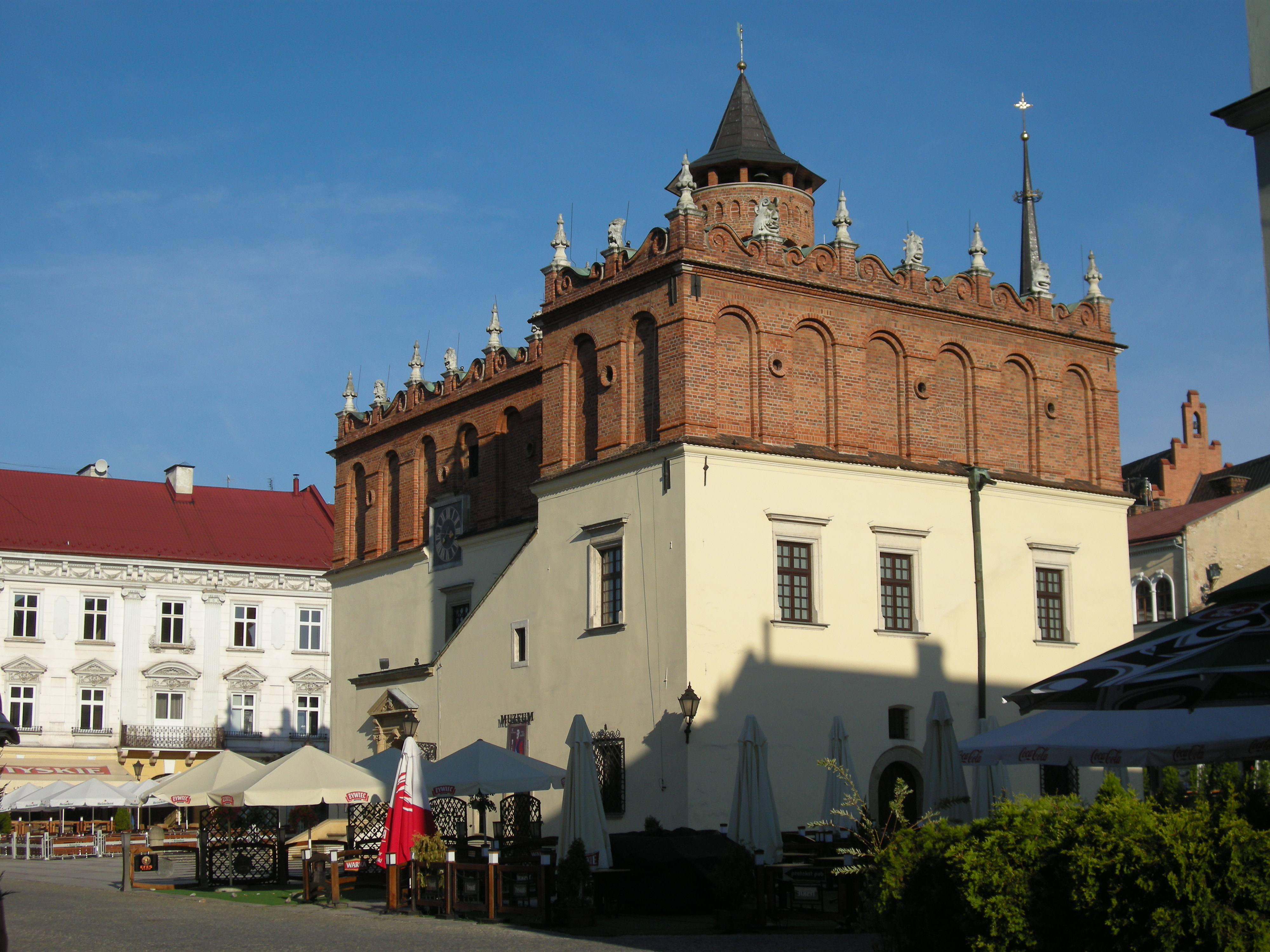 Ratusz od strony wschodniej